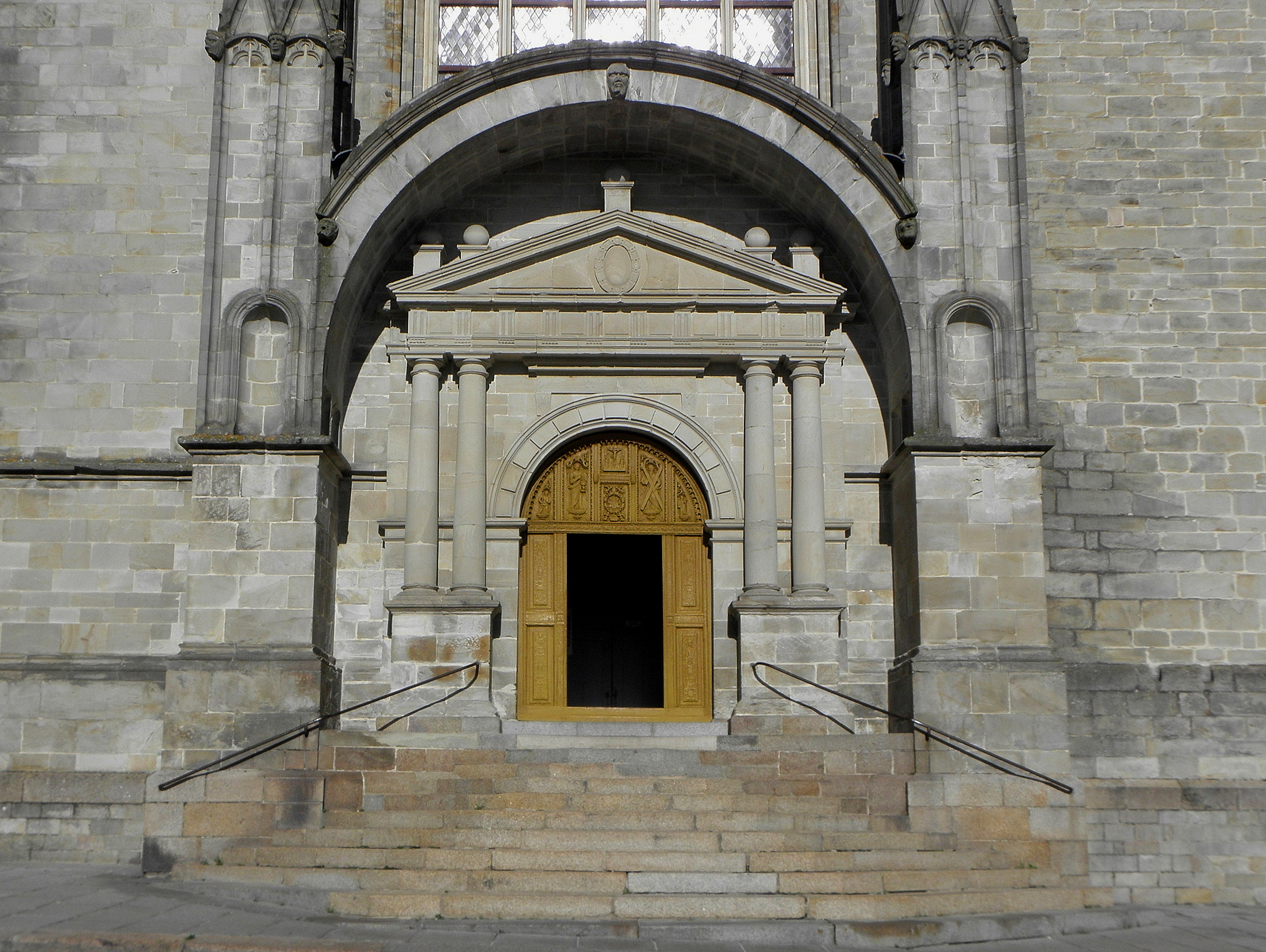 Façade ouest de l'église Notre-Dame de Vitré (35). Portail occidental.